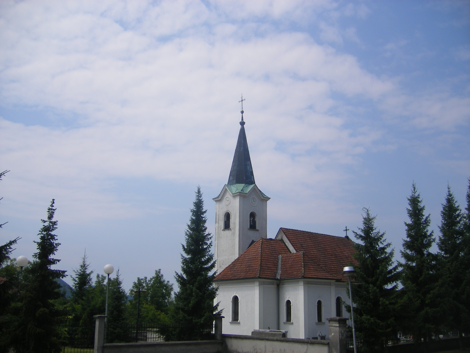 Dolsko (Dol pri Ljubljani municipality) - St. Agathe Church